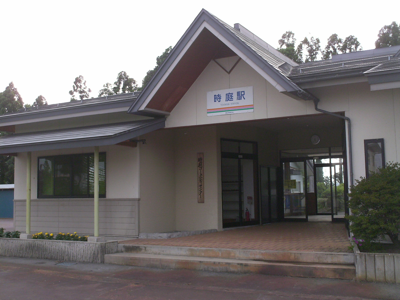 Tokiniwa Station. 時庭駅